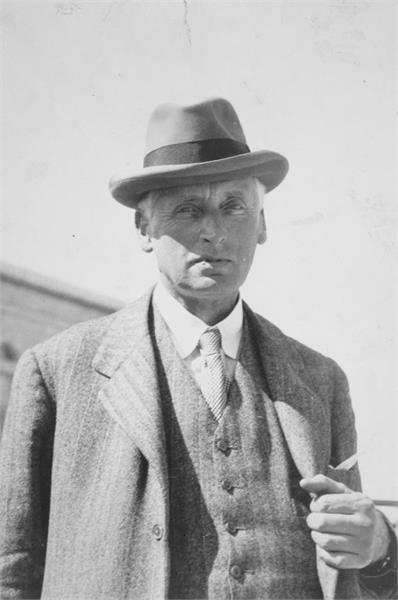 ירושלים - סיר בטרטון חבר ועדת החקירה - ב"כ השמרנים